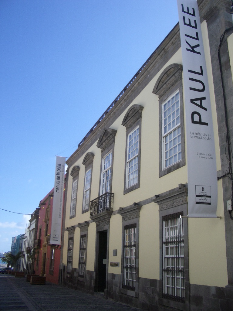 Fachada del Centro Atlántico de Arte Moderno (CAAM) en el barrio de Vegueta en la ciudad de Las Palmas de Gran Canaria.